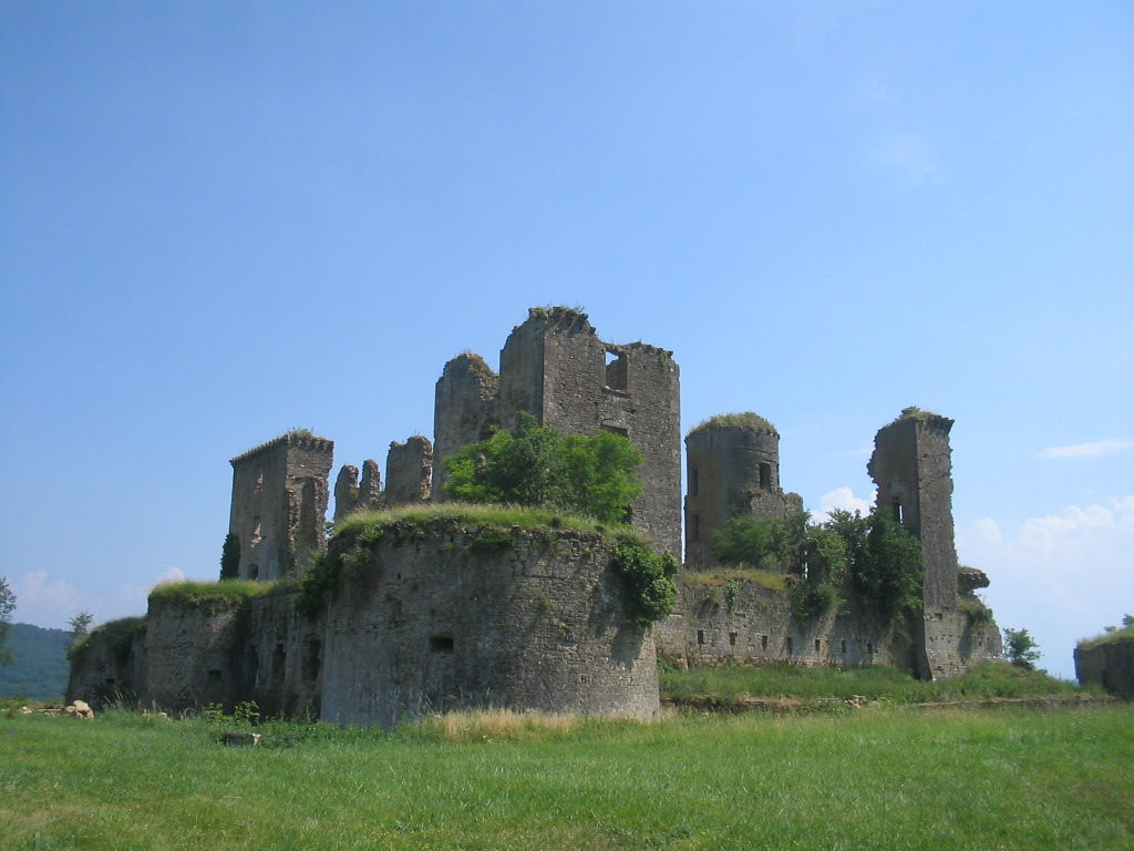 Chateau de Lagarde (Ariège). Photo de Arno Lagrange. GFDL. 19 juin 2005